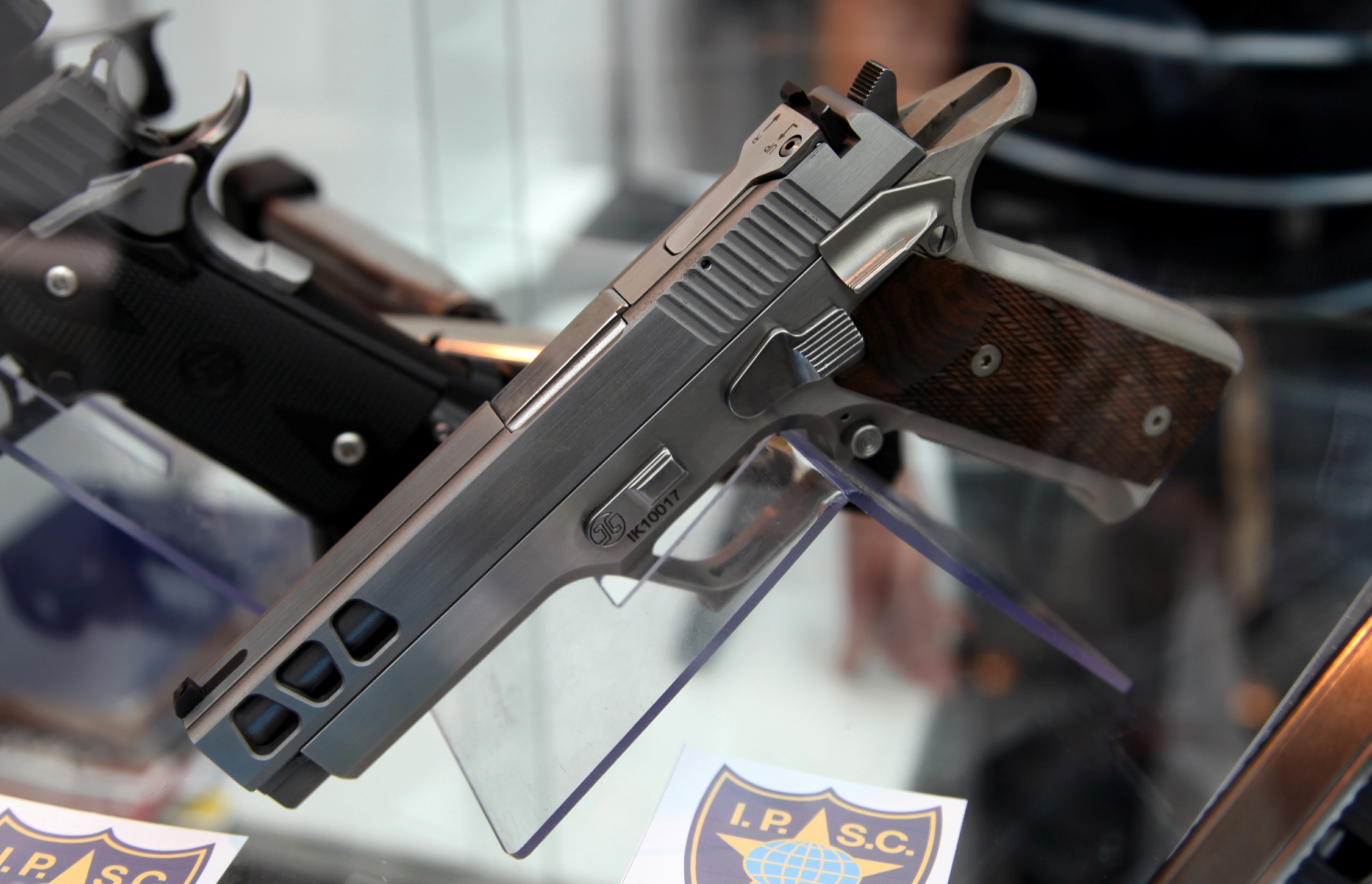 9x19 Pardini GT9-5″